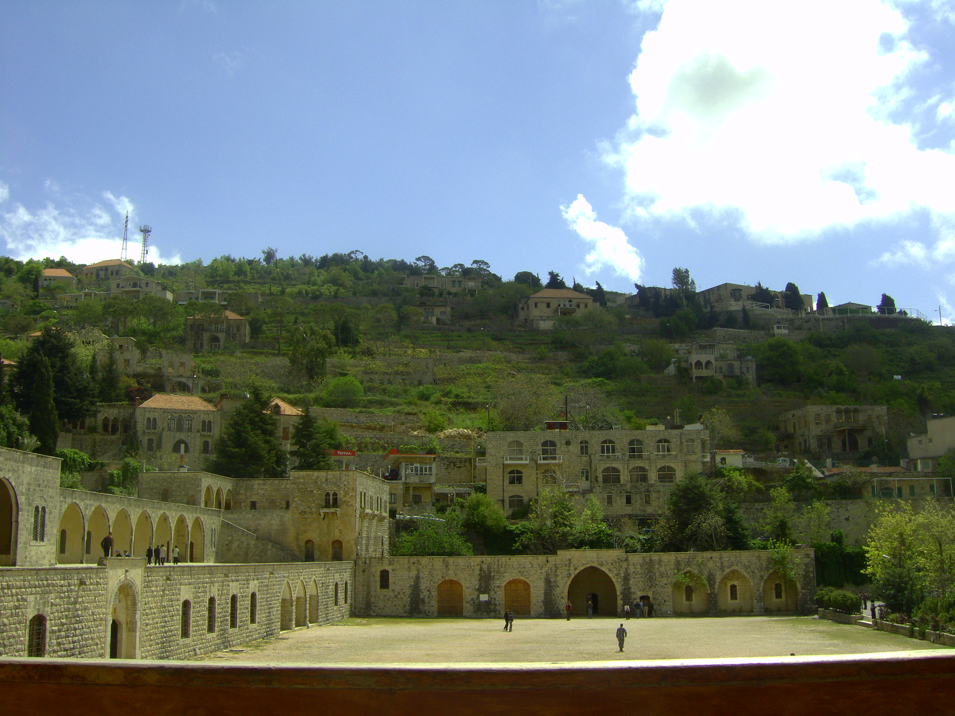 Vue depuis l'intérieur de beitedine